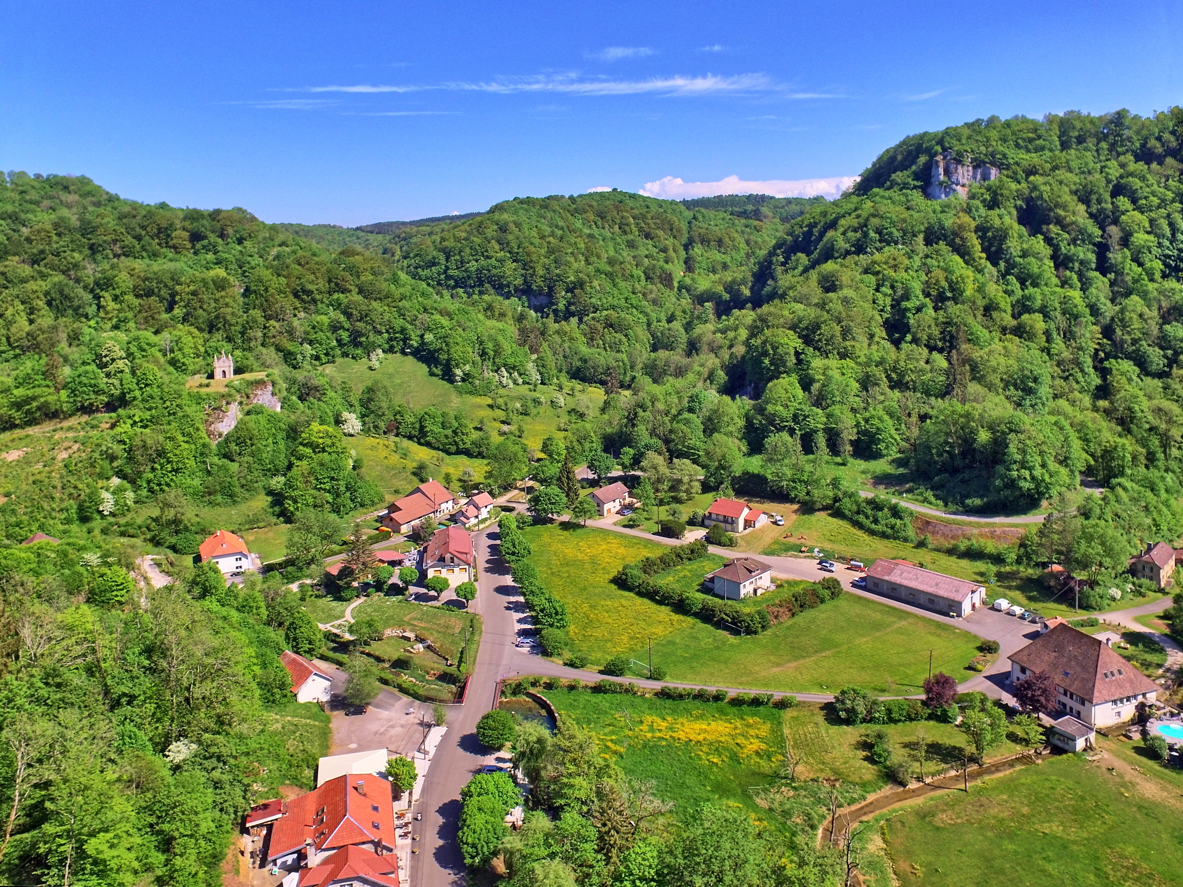 Le Val de Cusance